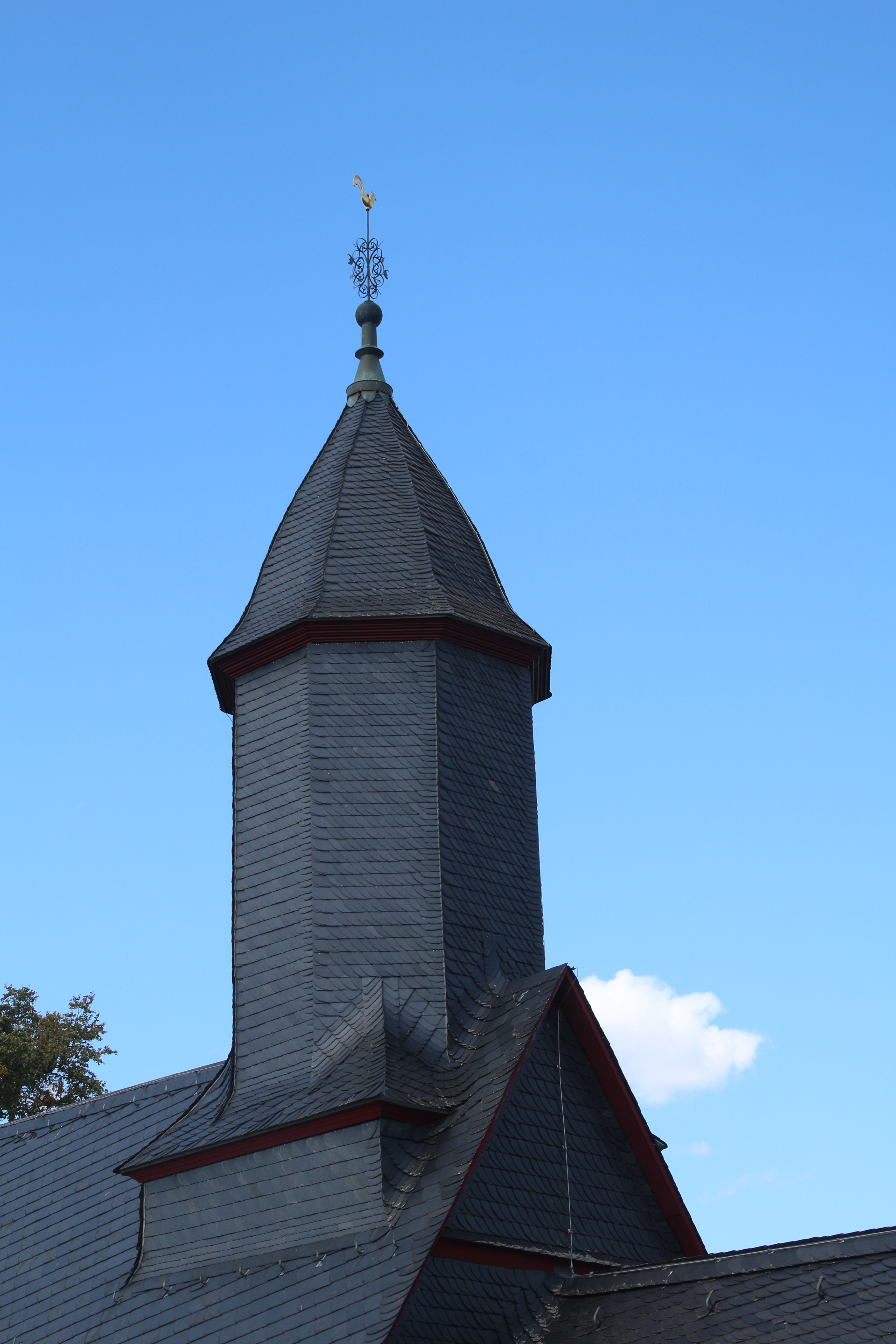 Evangelische Kirche Eichelsdorf, Gemeinde Nidda, Wetteraukreis, Hessen